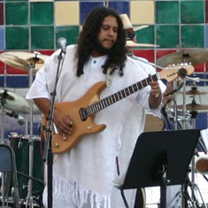 Jorge Calleja en concierto con Gallina Negra en 2009, en el Centro Nacional de las Artes, Ciudad de México.